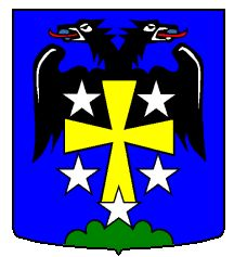 Wappen von Ausserberg Kanton Wallis SCHWEIZ